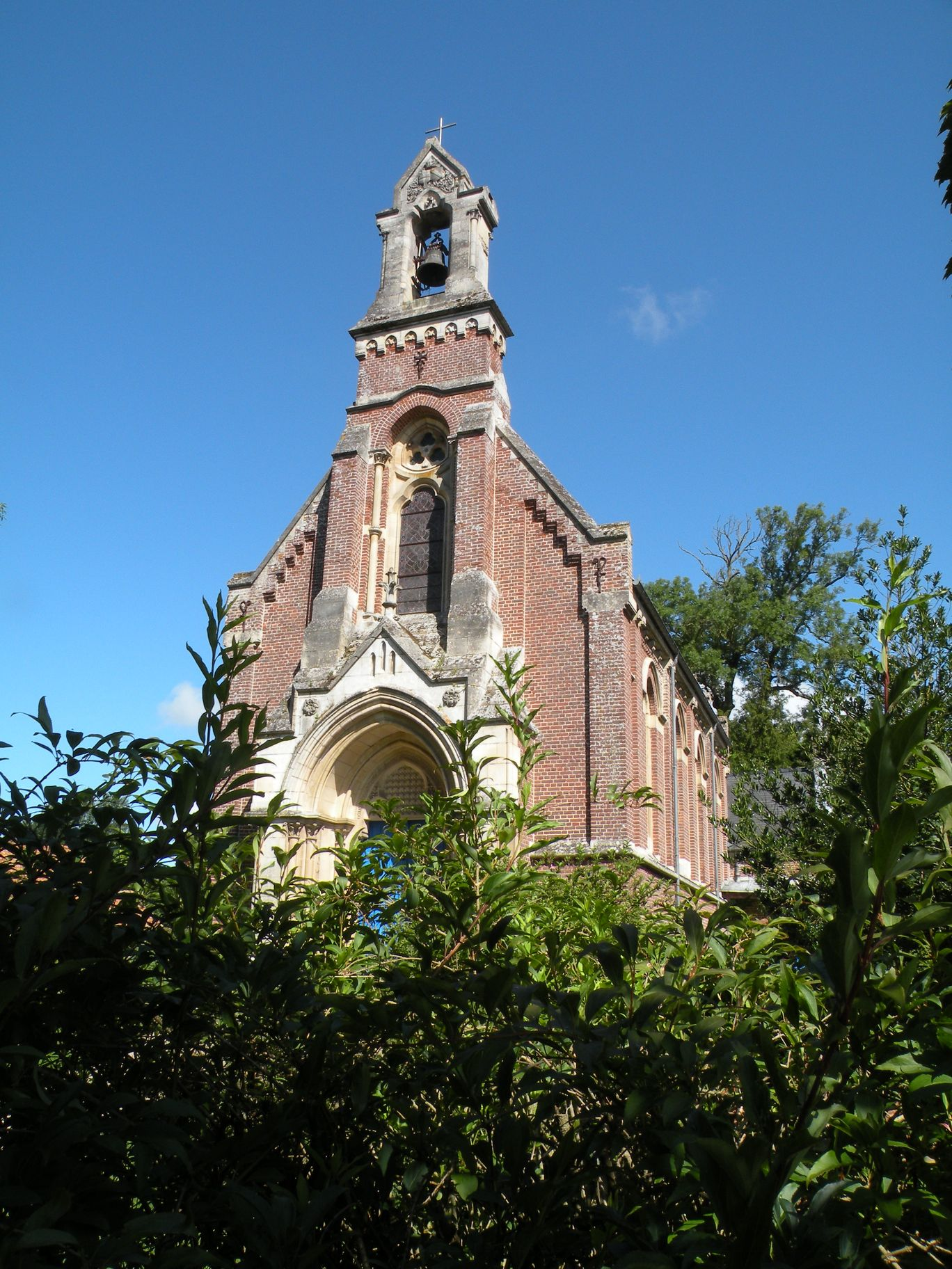 L'église de Pittefaux.